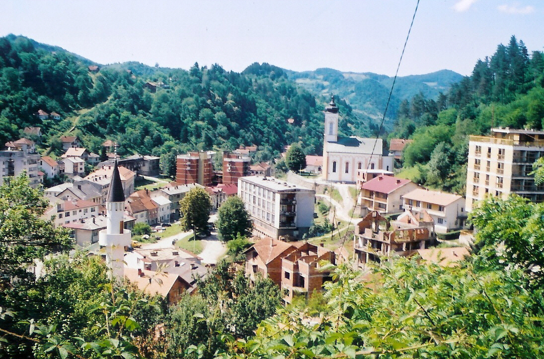 Beschreibung: Panorama Srebrenica Quelle: fotografiert im August 2004 Fotograf: Benutzer:Samum